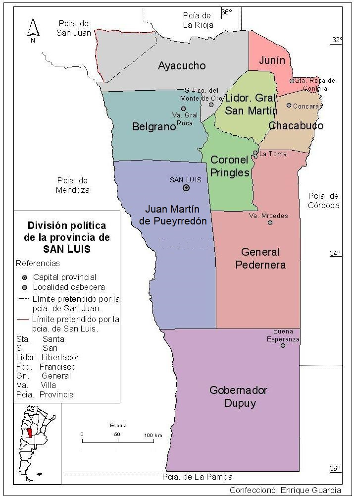 Mapa de la división política-administrativa de la provincia argentina de San Luis.